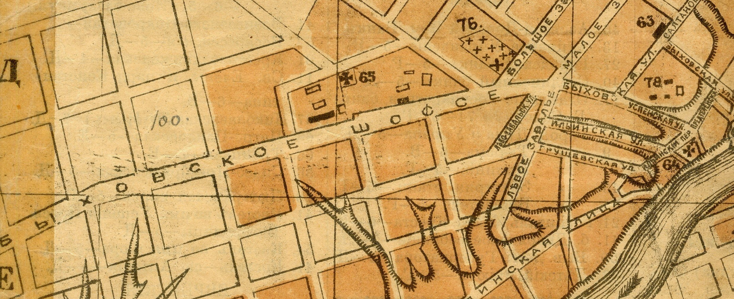 Беларуская (тарашкевіца): Магілёў (Магілёў). Плян места